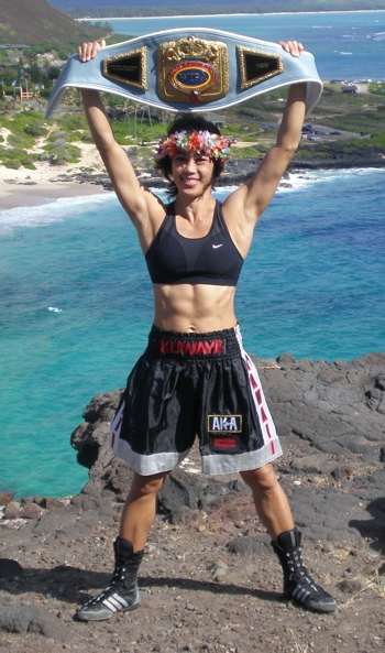 Eileen Olszewski holding up her W.I.B.A. title belt.